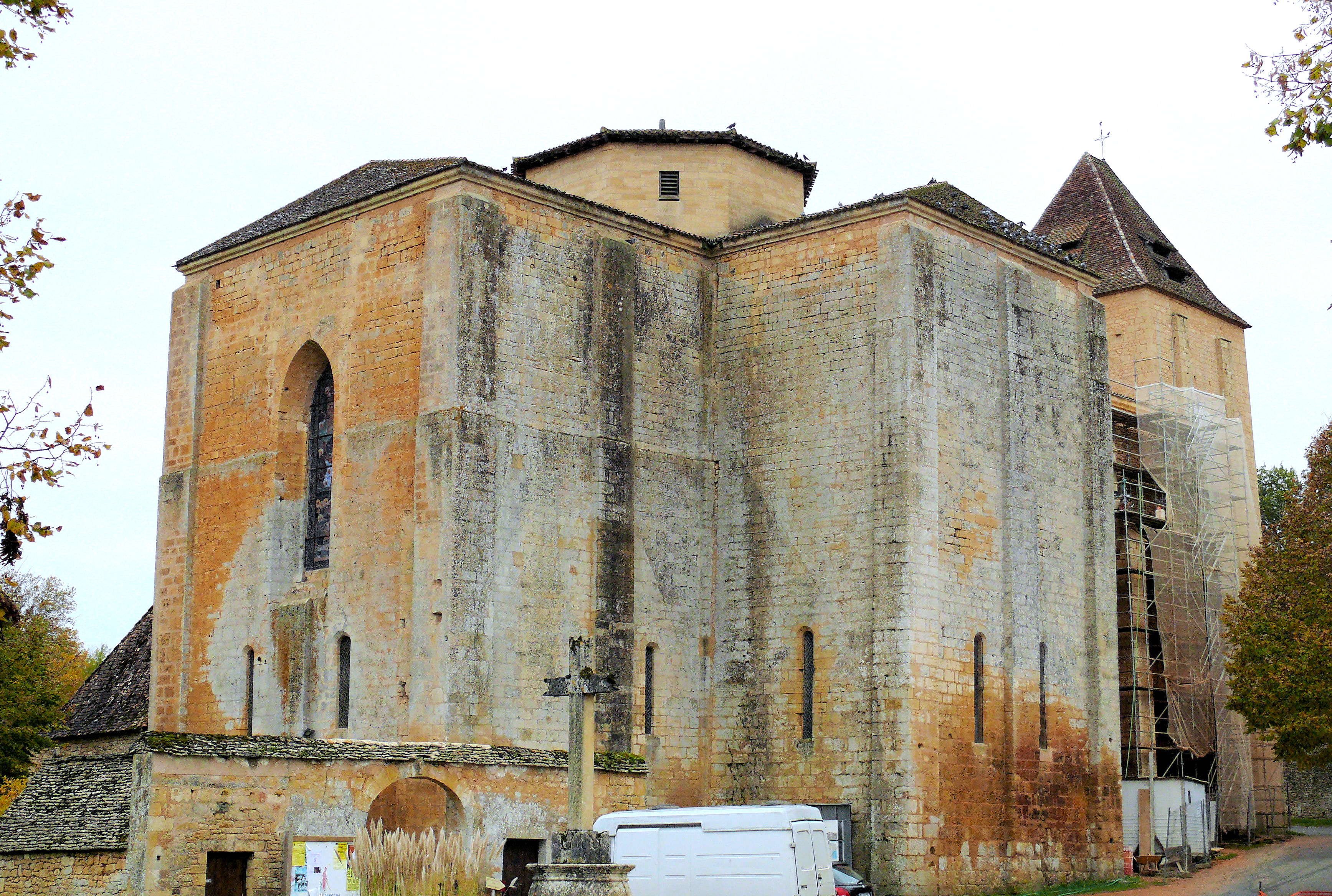 Paunat - Église Saint-Martial